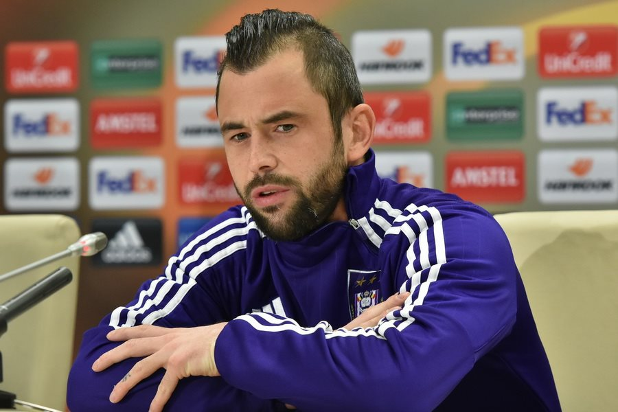 Стівен Дефур - футболіст Андерлехта